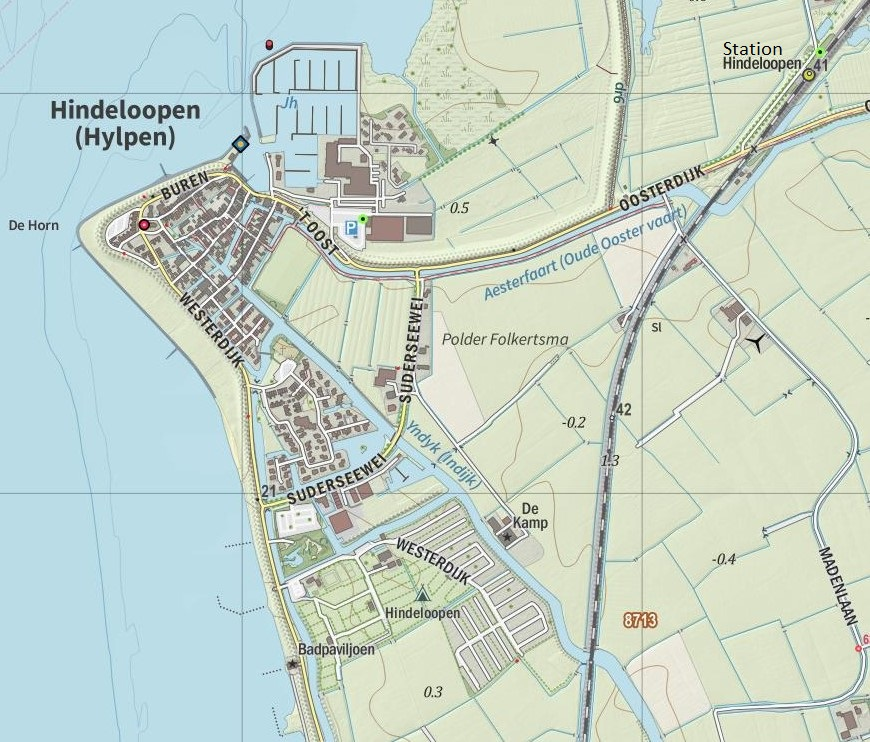 Kaart van de stad Hindeloopen